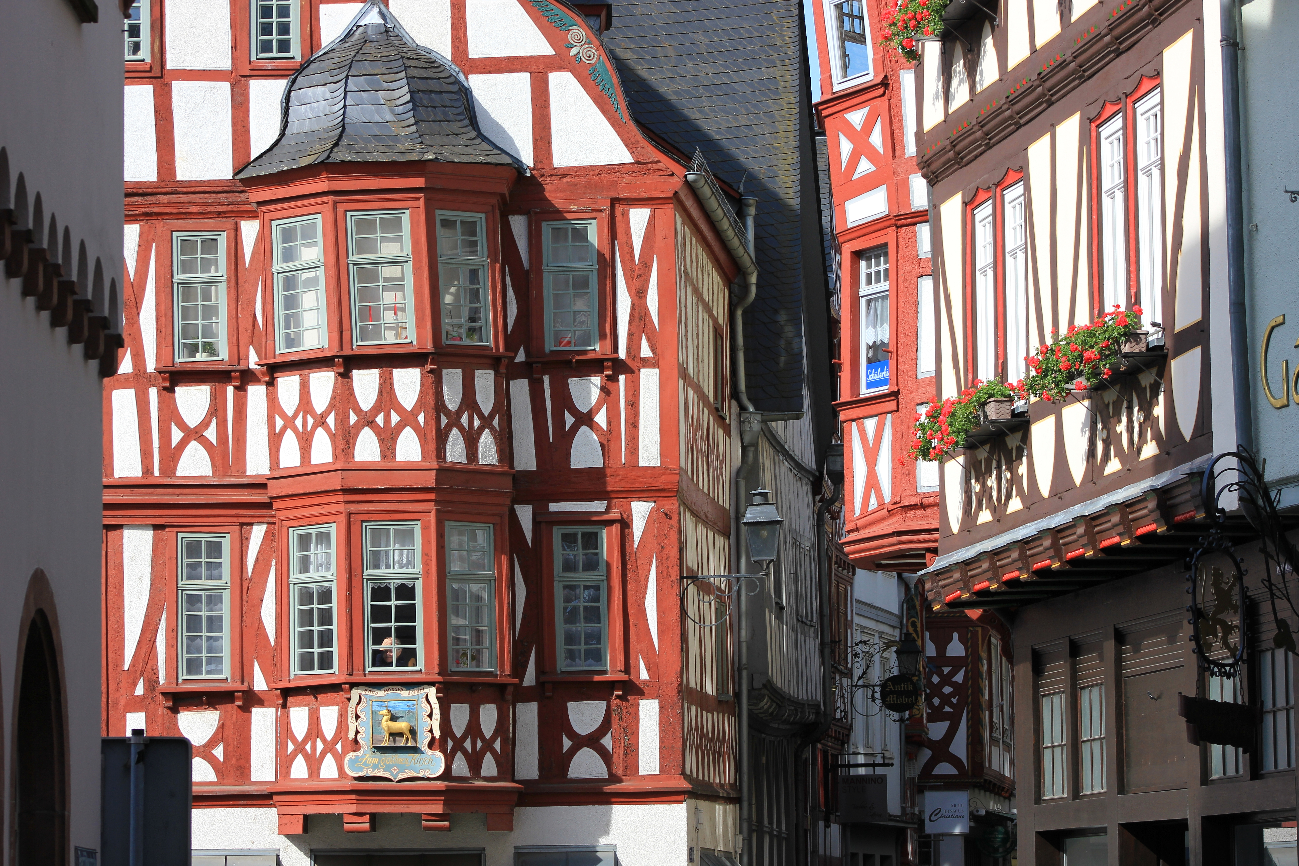 Fachwerkhäuser in Limburg an der Lahn. Altstadt.